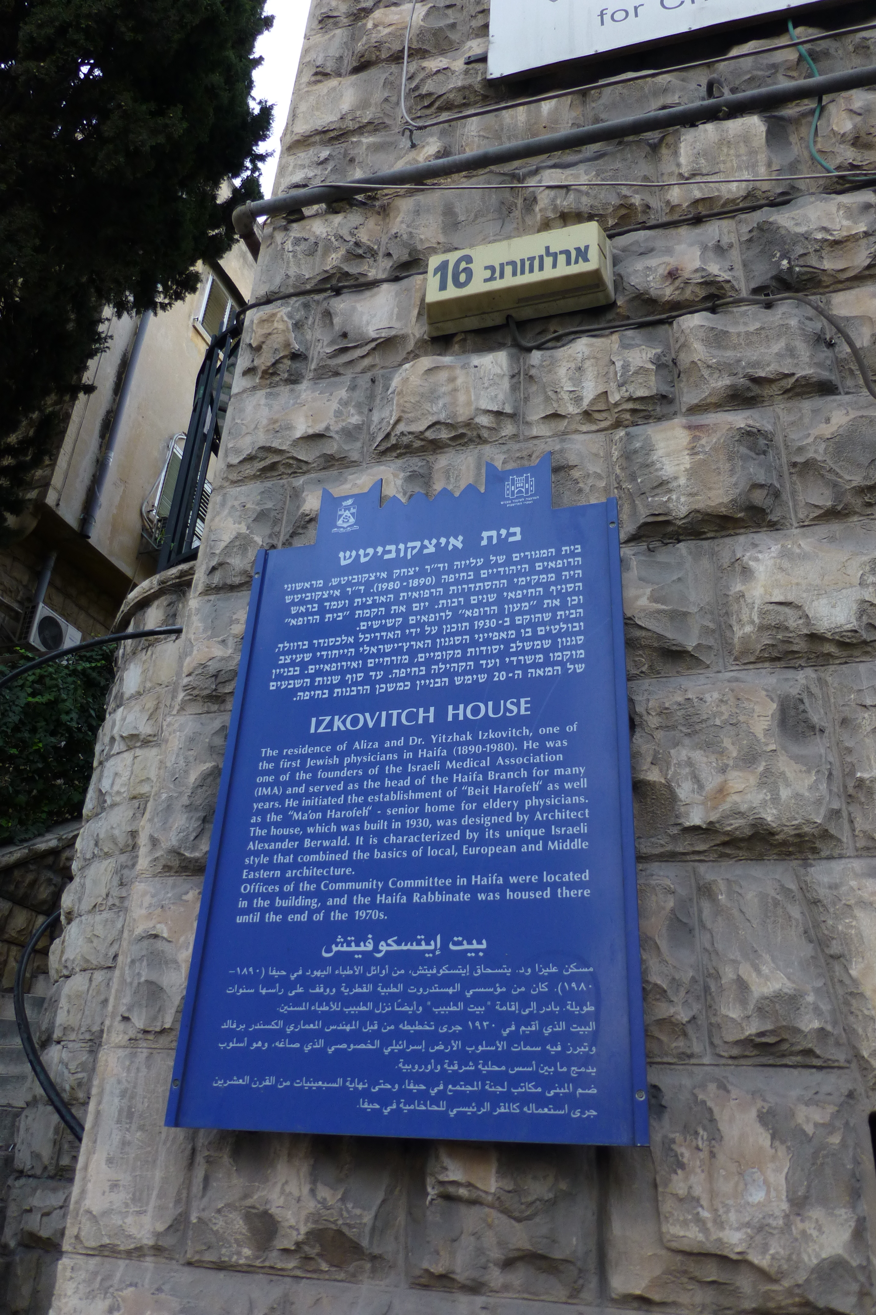 בית איצקוביץ, רח' ארלוזורוב 16, חיפה